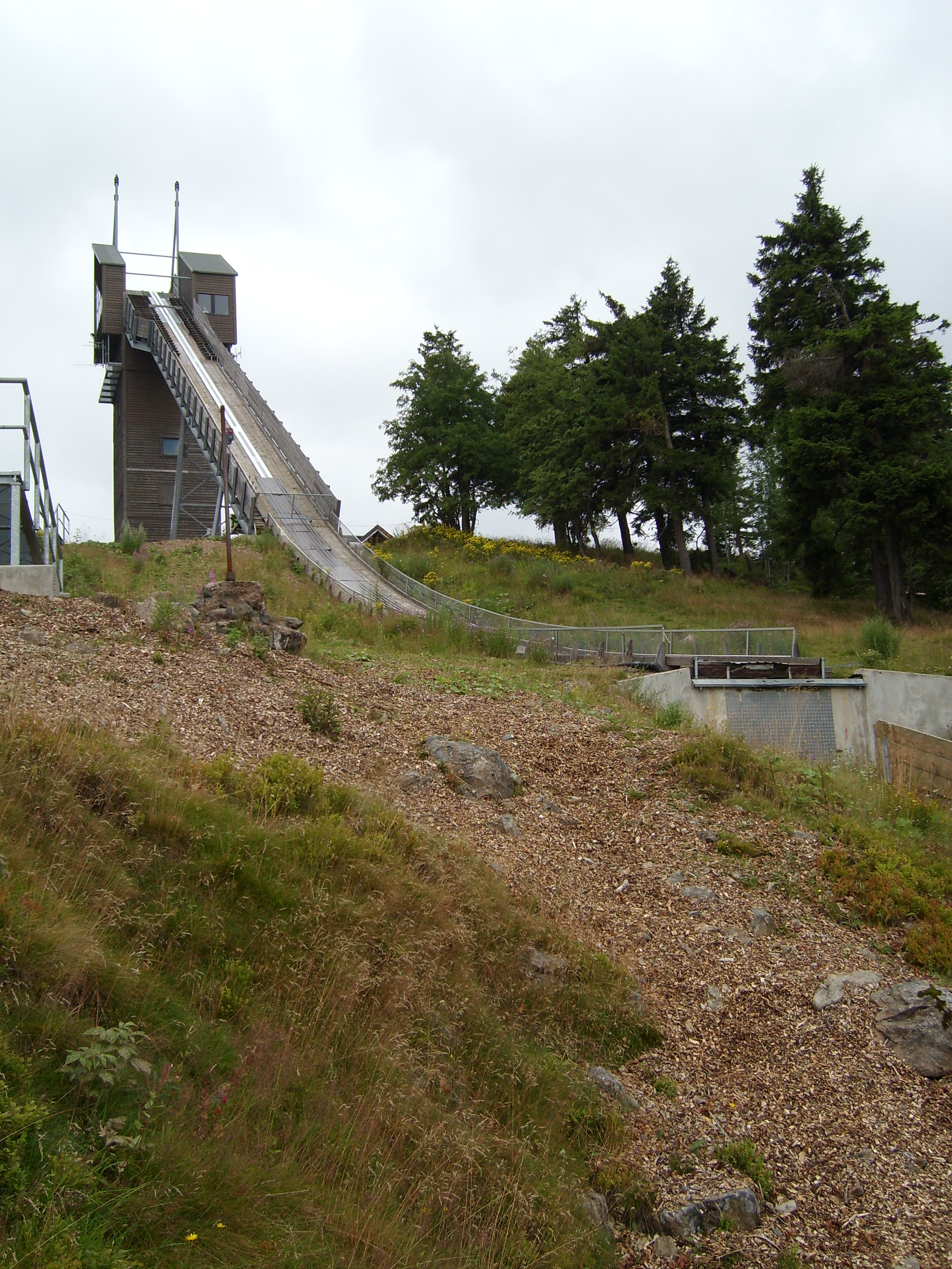 Wurmbergschanze auf dem Wurmberg im Harz, Sommer 2008